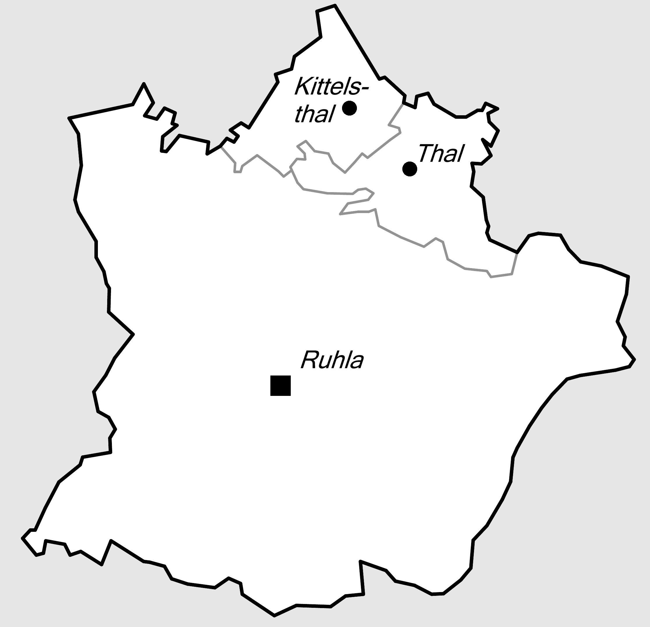 Lagekarte zus Stadt Ruhla.